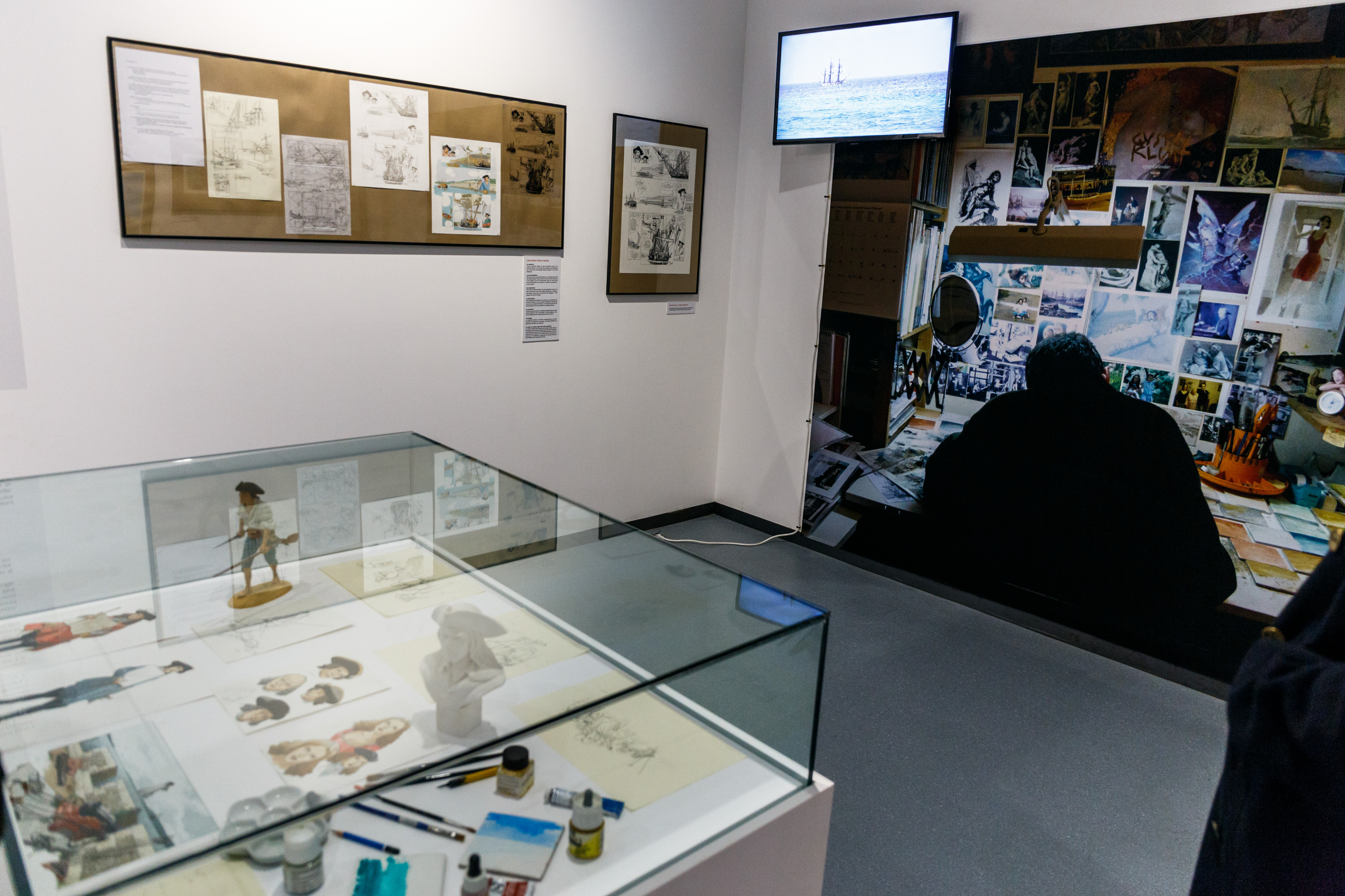 Exposition L’Épervier, BD de Patrice Pellerin, à la médiathèque François-Mitterrand Les Capucins à Brest, entre janvier et avril 2017.